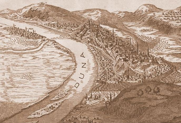 A Margitsziget 1686 körül.